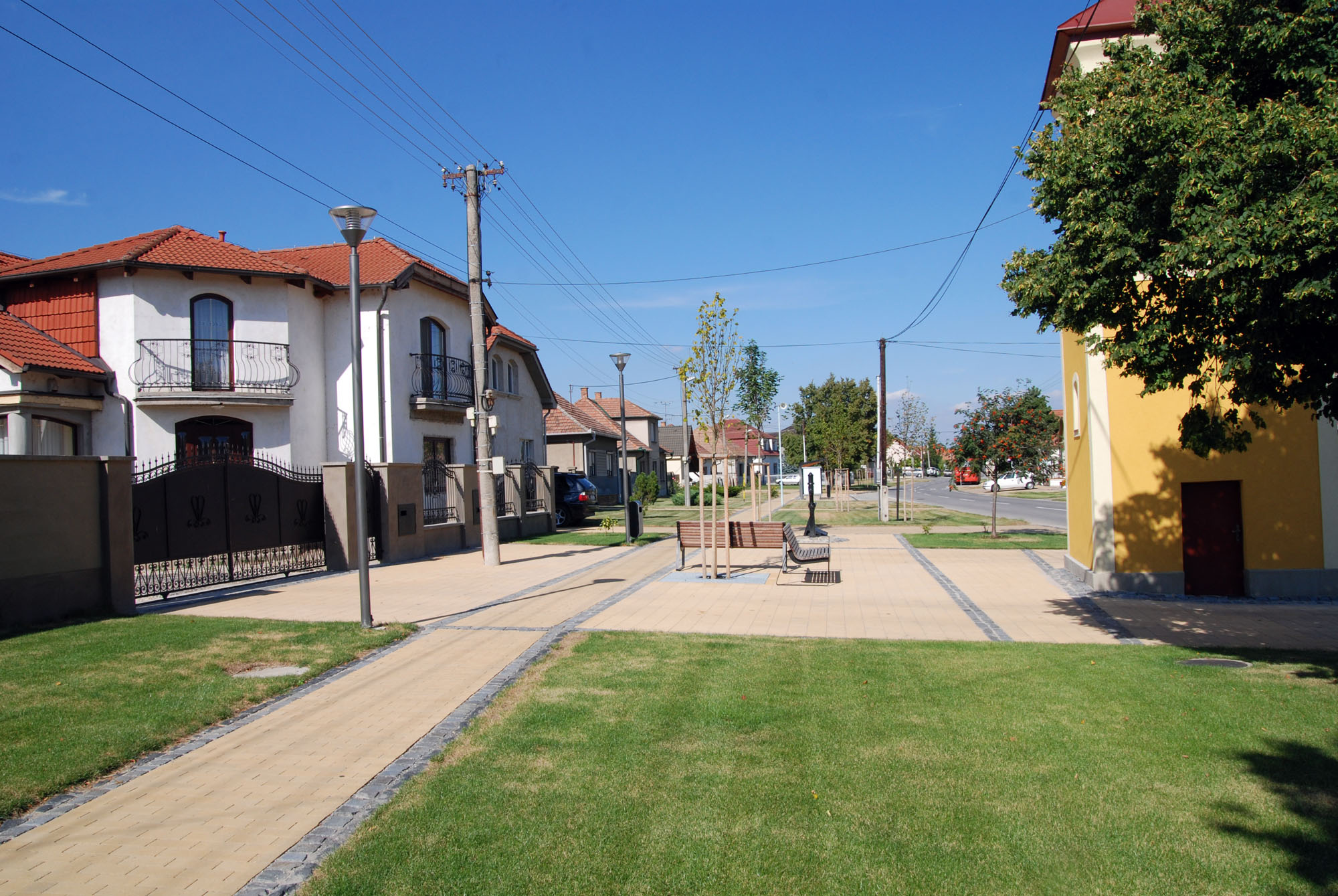 Nová Dedinka